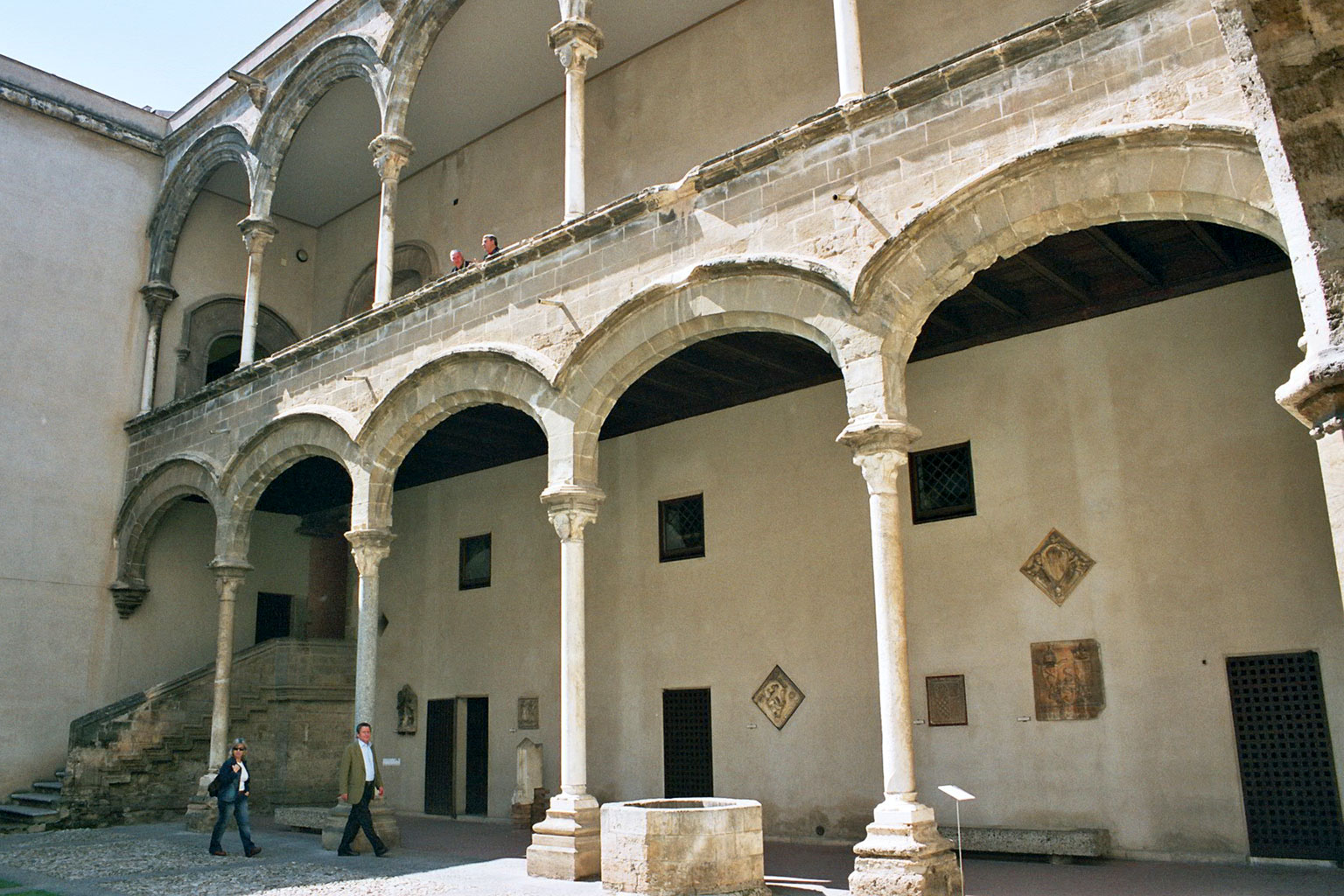 Palazzo Abatellis, Palermo Inner yard